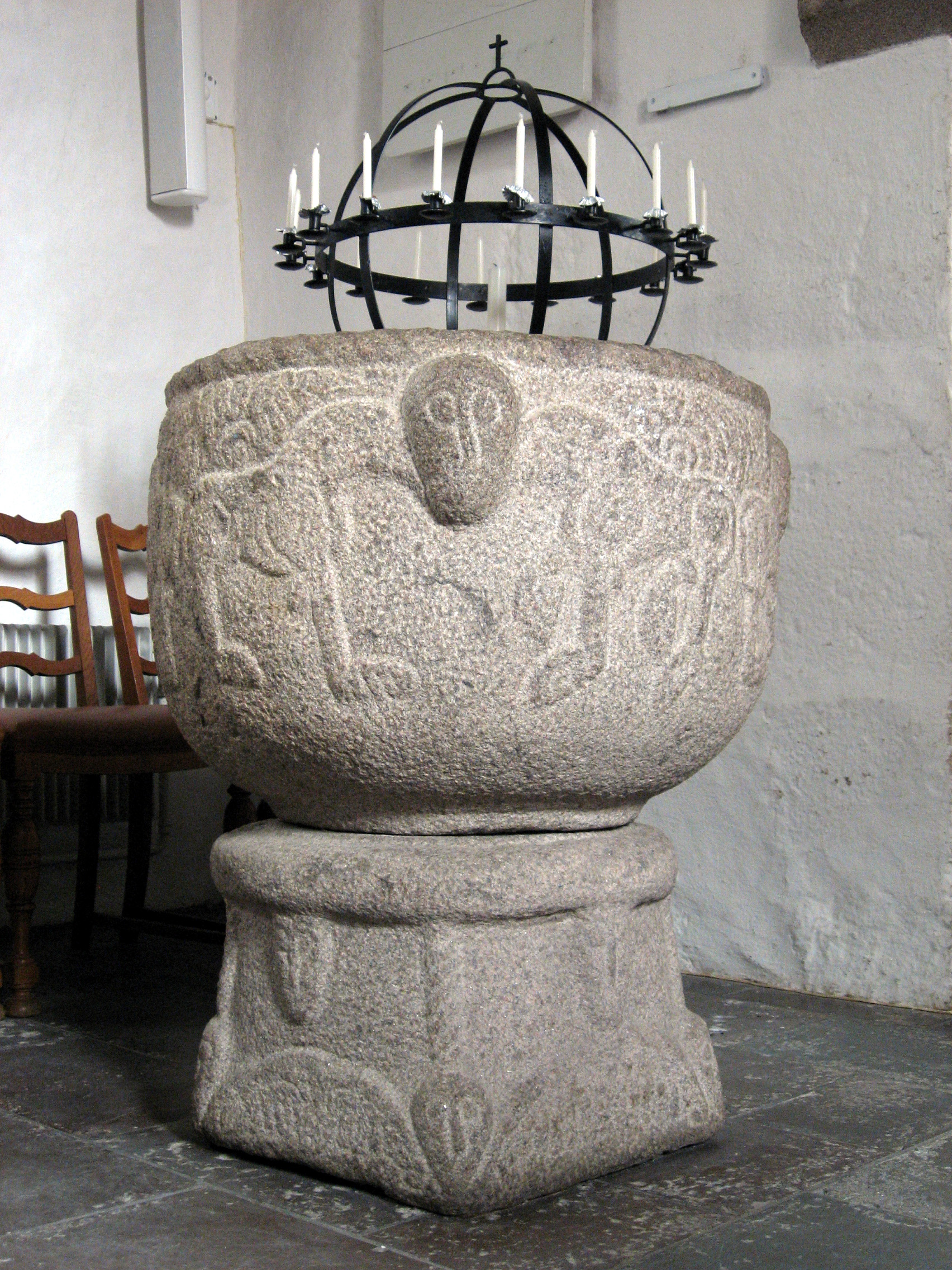 Hasle Kirke in Hasle, Århus, Denmark. Romanesque baptismal font.